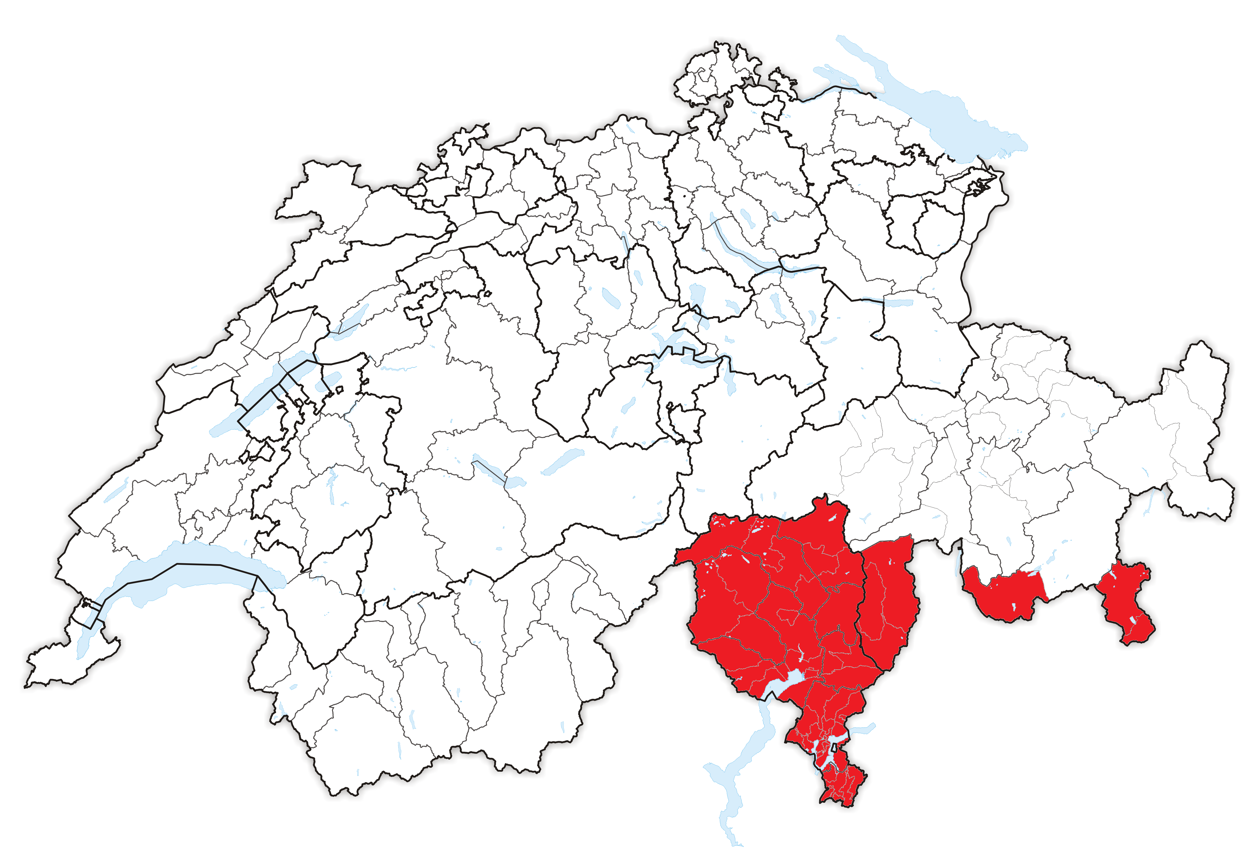 io, regioni di lingua italiana in svizzera